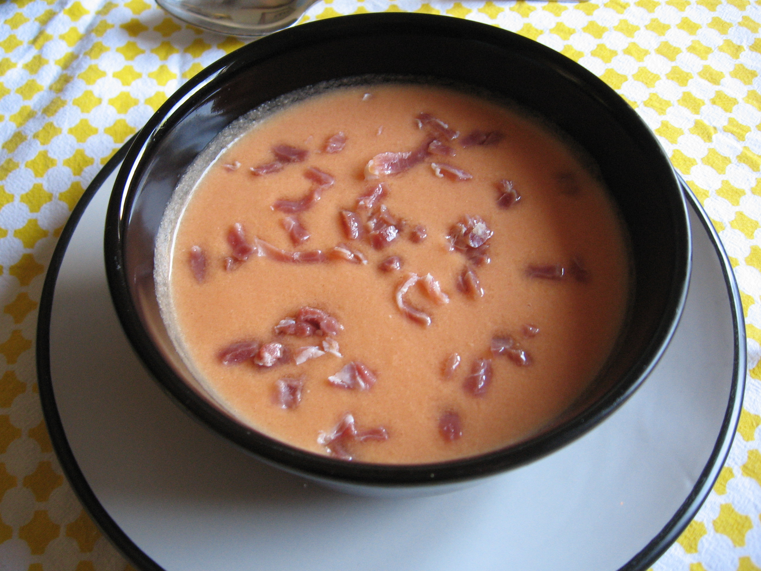 Salmorejo de Córdoba (Andalucía, España). Crema fría a base de tomates, pan, ajos, aceite de oliva, vinagre y sal, adornado con virutas de jamón serrano.